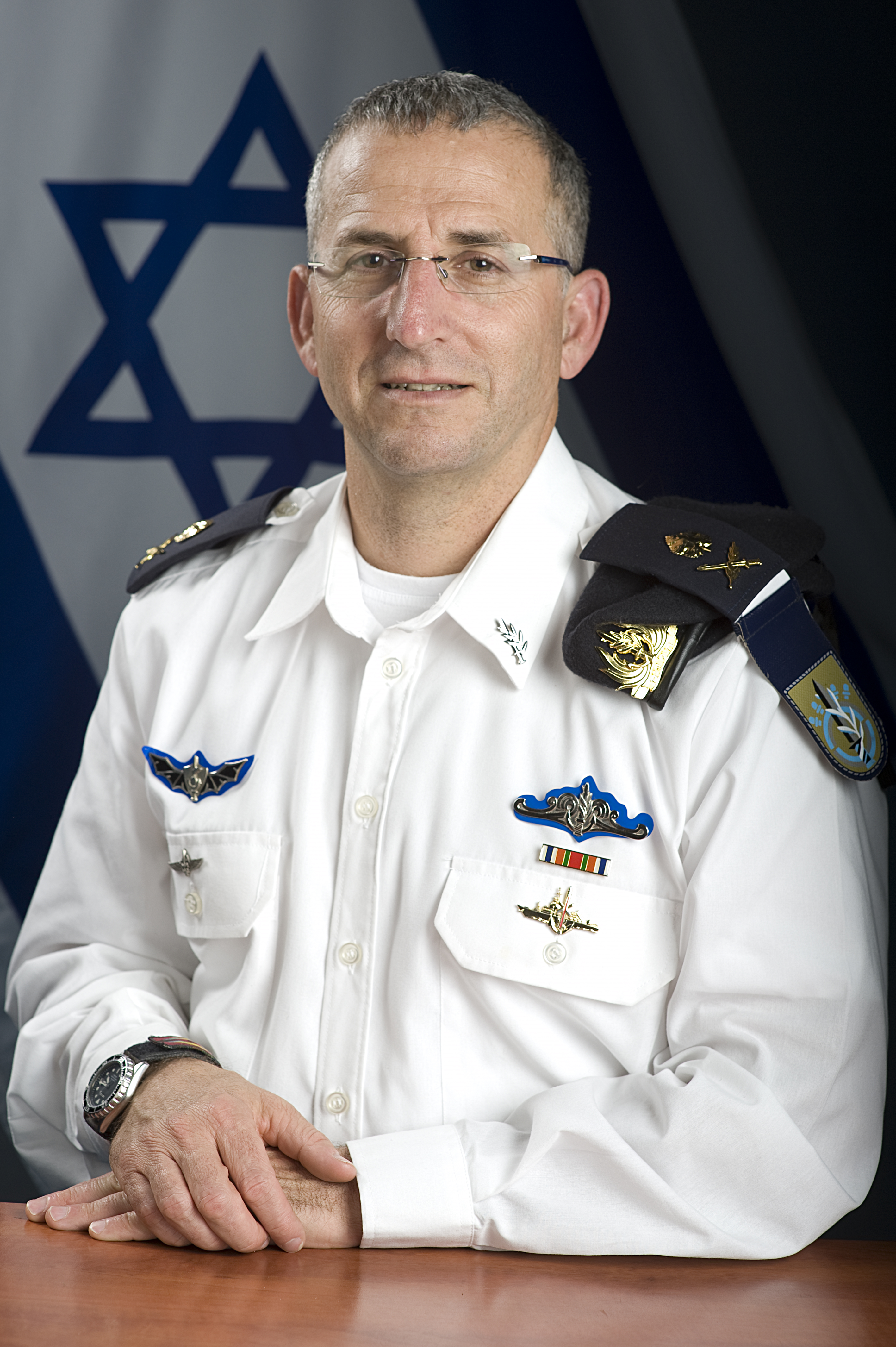 אלוף רם רוטברג מפקד חיל הים